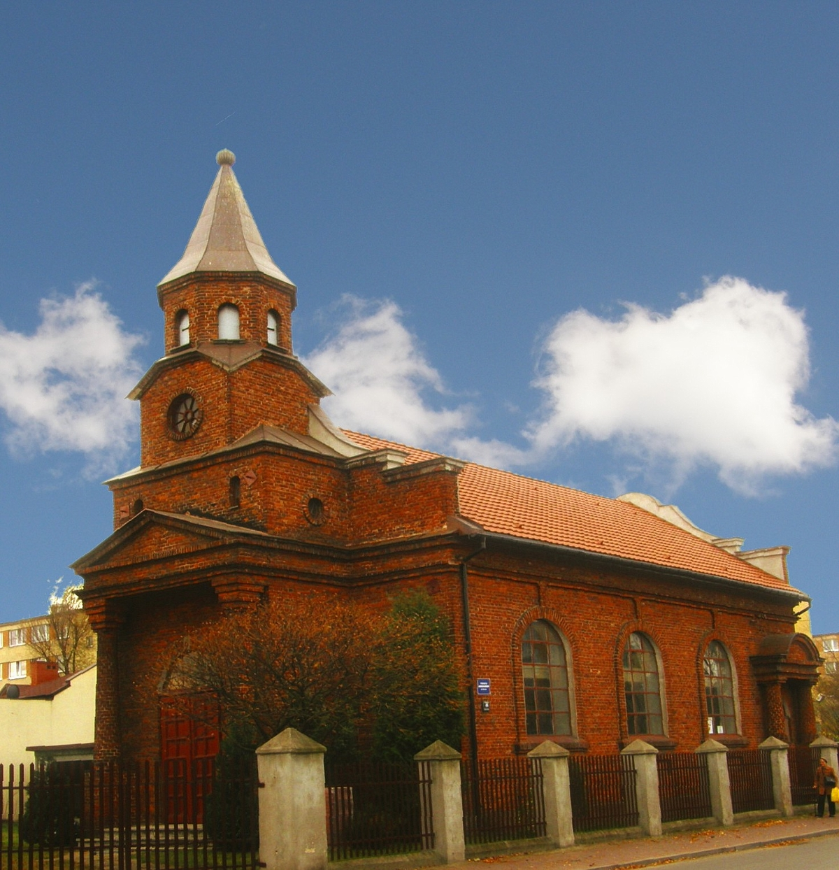 KOŚCIÓŁ_EWANGELICKO-AUGSBURSKI_W_ZELOWIE